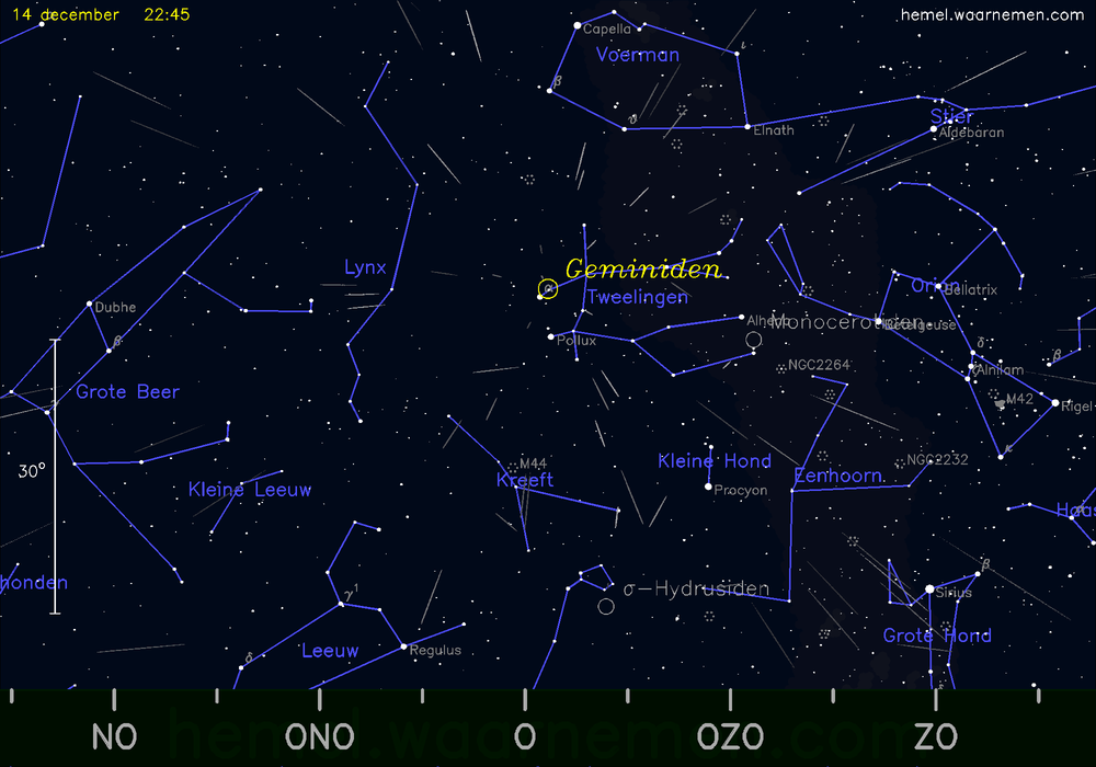 De meteorenzwerm Geminiden tijdens het maximum in 2015